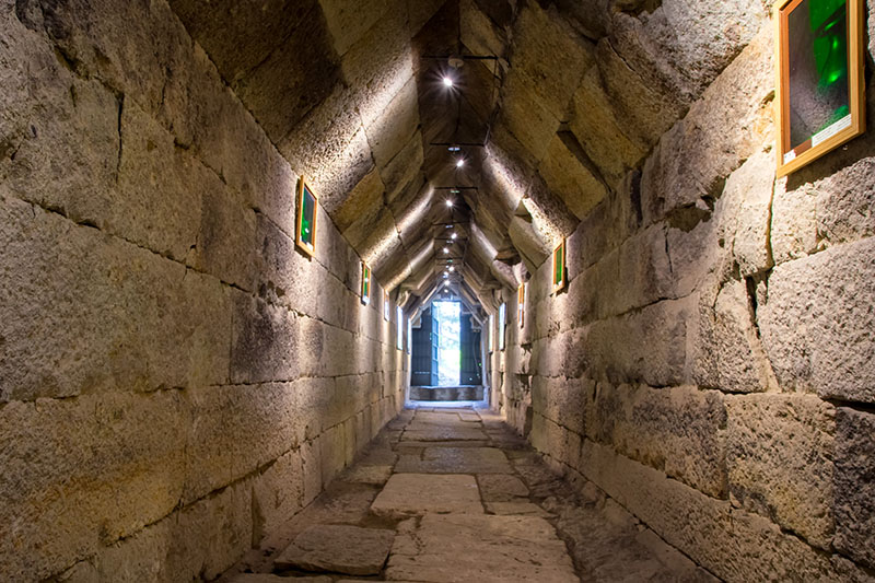 Тракийската гробница до село Мезек